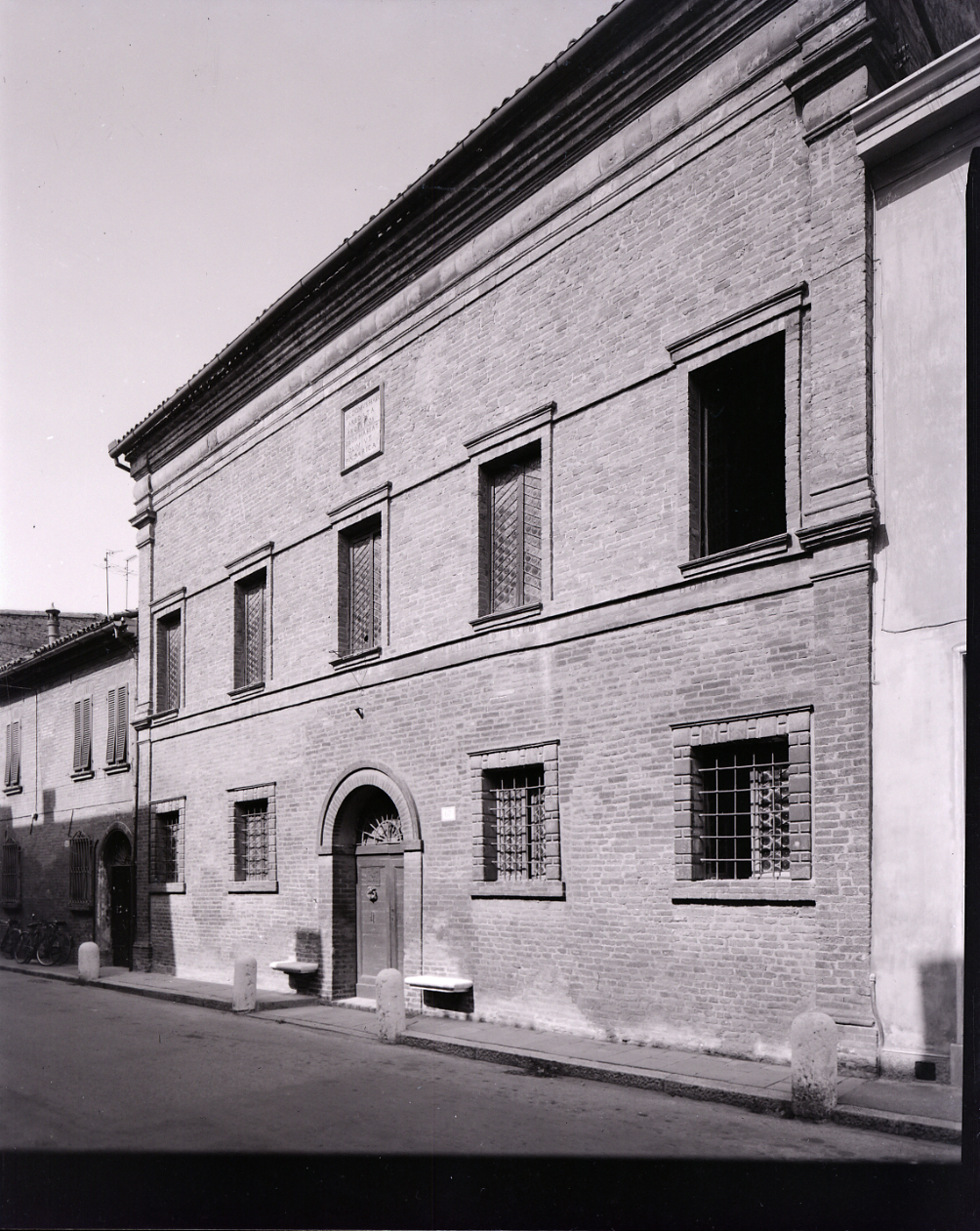 Servizio fotografico : Ferrara, 1965 / Paolo Monti. - Buste: 8, Fototipi: 9 : Negativo b/n, gelatina bromuro d'argento/ pellicola ; 10x12. - ((Serie costituita da 9 negativi identificati con i nn.: 10623-10624, 10629-10630, 10633-10636. La suddetta serie è contenuta nella scatola identificata con la numerazione 10501-11000G. - Occasione: Documentazione per la pubblicazione: Emilio CECCHI, Natalino SAPEGNO (a cura di), Storia della Letteratura Italiana, 9 voll., Milano, Garzanti, 1966 e segg.